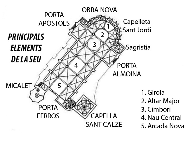 Principals elements Seu València